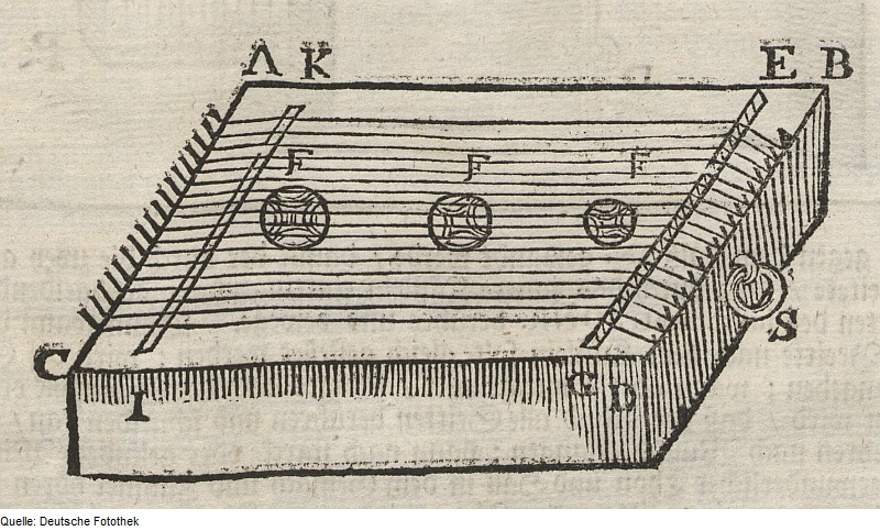 Original image description from the Deutsche Fotothek Akustik & Musikinstrument & Aeolsharfe & Windharfe & Saiteninstrument & Ordensliteratur